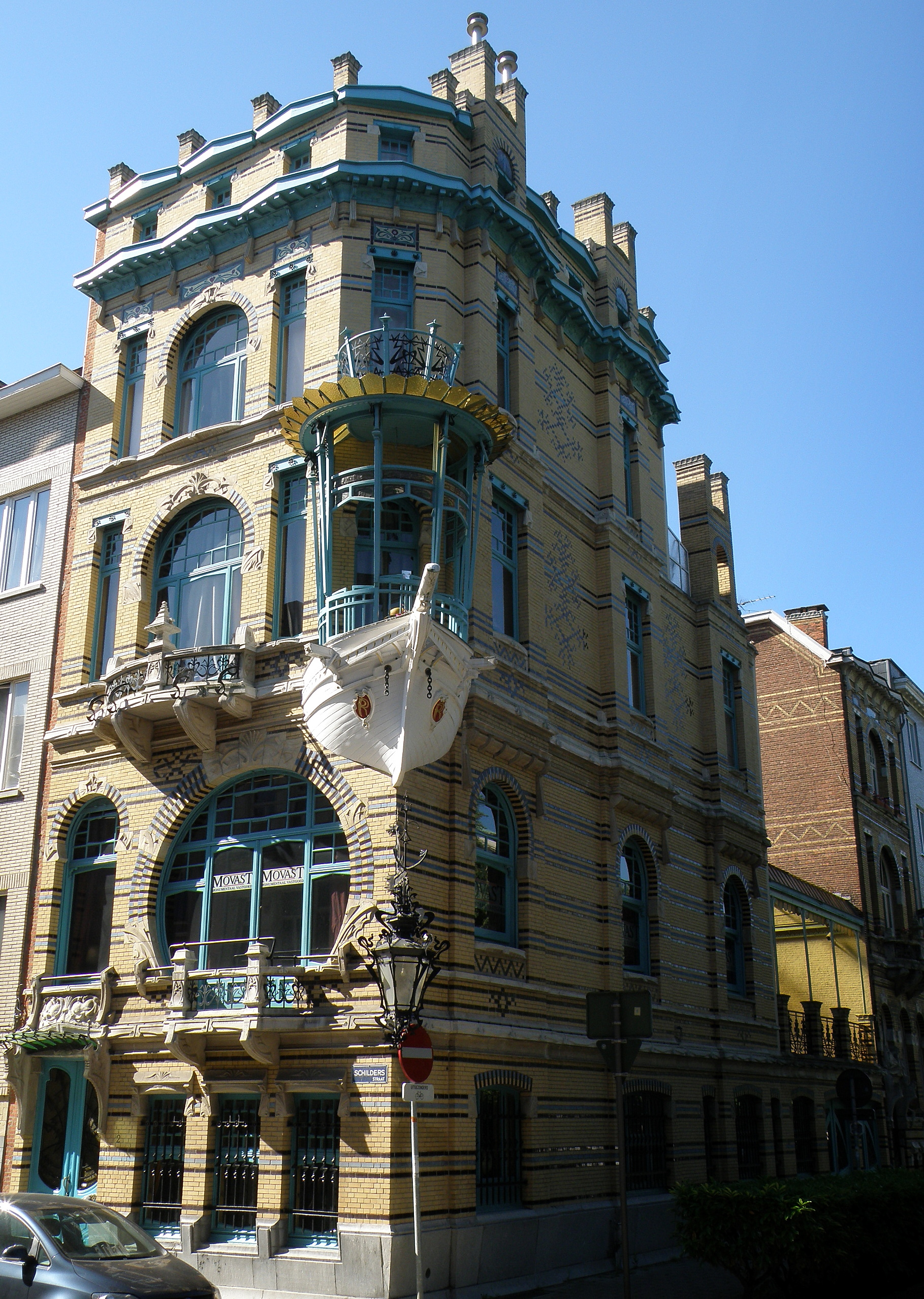 Antwerpen, district Antwerpen, wijk Zuid. Art nouveau-huis, genaamd "'t Bootje", aan de Schildersstraat nr. 2 (hoek Schildersstraat/Plaatsnijdersstraat). Ontwerp van archit. Frans Smet-Verhas uit 1901. Vgl. verder Inventaris Bouwkundig Erfgoed.